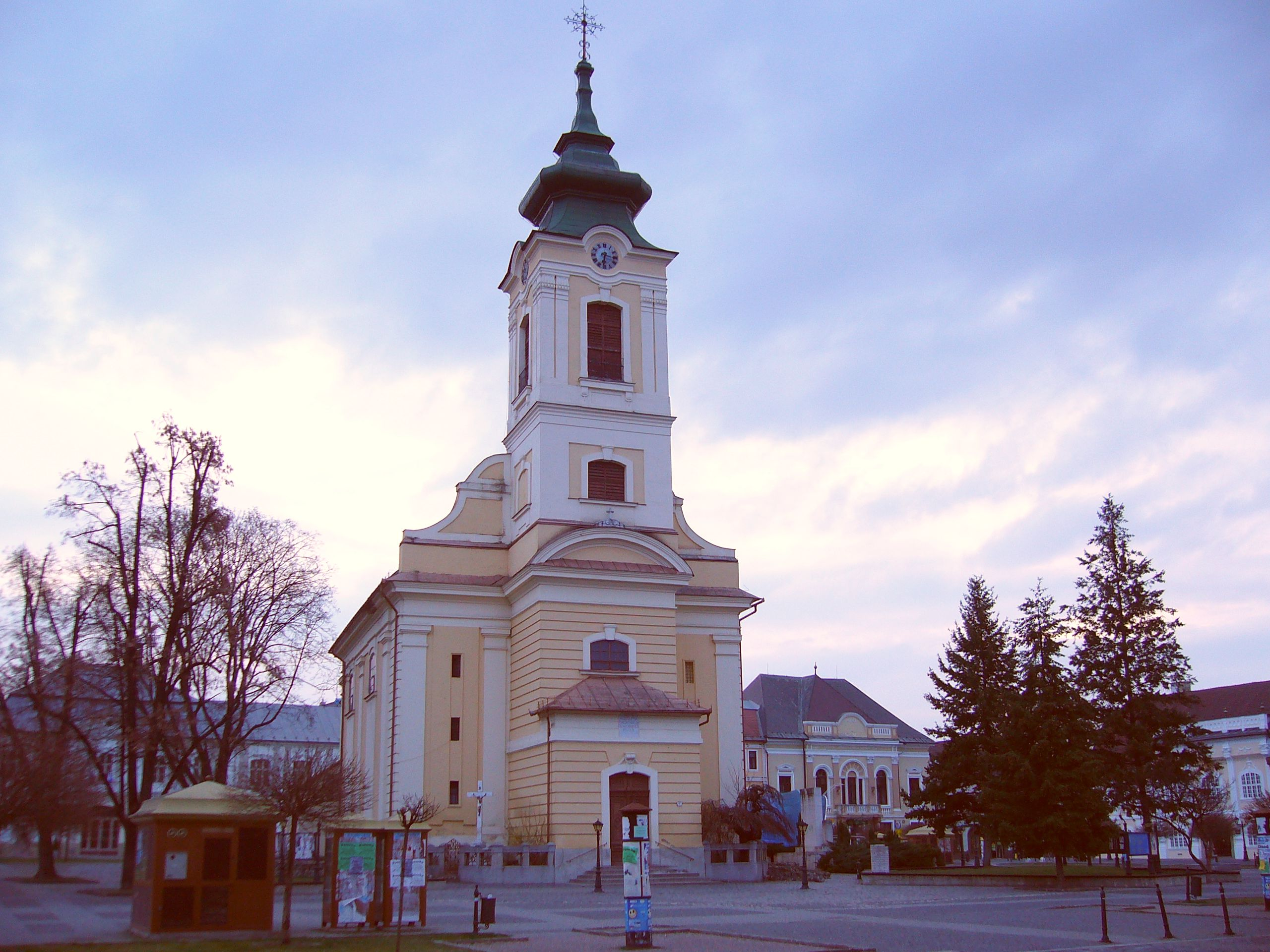 Rimaszombat, római katolikus templom